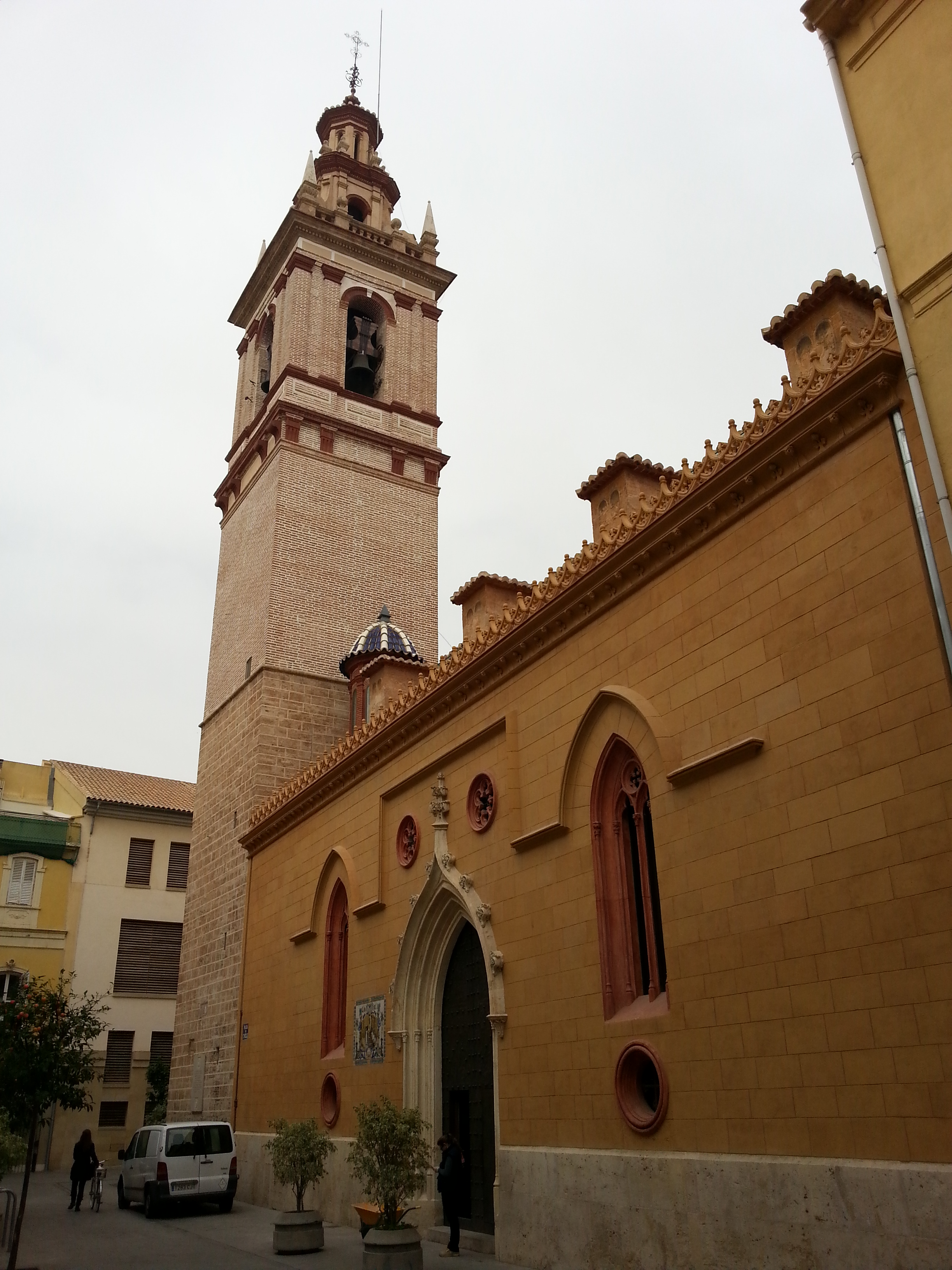 Església de Sant Nicolau de València.